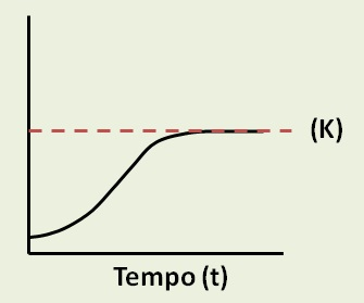 Crecimento populacional logístico.